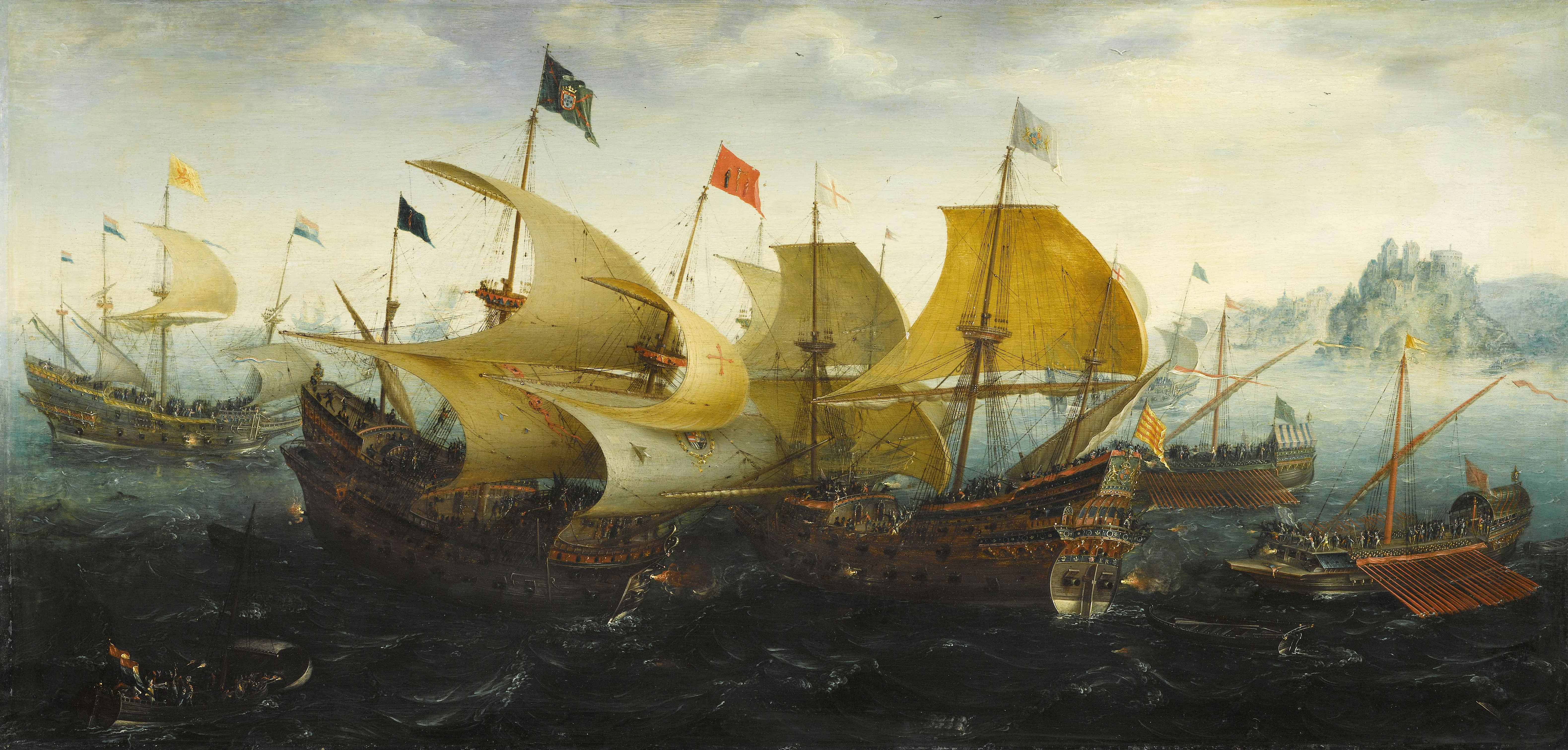 Tijdens de Slag bij Cadiz verenigden de Hollanders en Engelsen hun krachten in hun strijd tegen de Spanjaarden. Hier wordt de Hollandse viermaster Neptunes van admiraal Johan van Duivenvoorde gesteund door de Engelse Ark Royal in een aanval op de Spaanse San Felipe. In werkelijkheid nam het Engelse schip geen deel aan de slag. Aert Anthonisz gaf het vaartuig weer omdat het zo'n belangrijk symbool was voor de Engelse zeemacht.